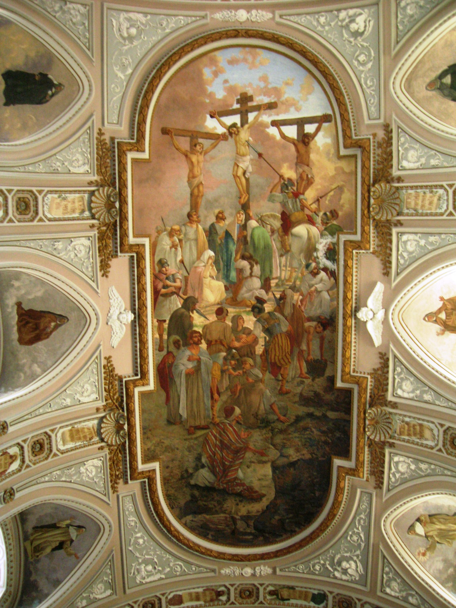 Affresco della volta del Santuario del Sacro Cuore di Castellammare di Stabia